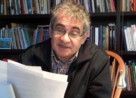 Bernardo Atxaga idazlea 2009an.